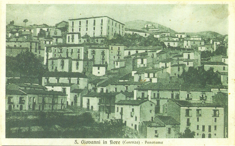 San Giovanni in Fiore - Palazzo Barberio Toscano cartolina anni '30